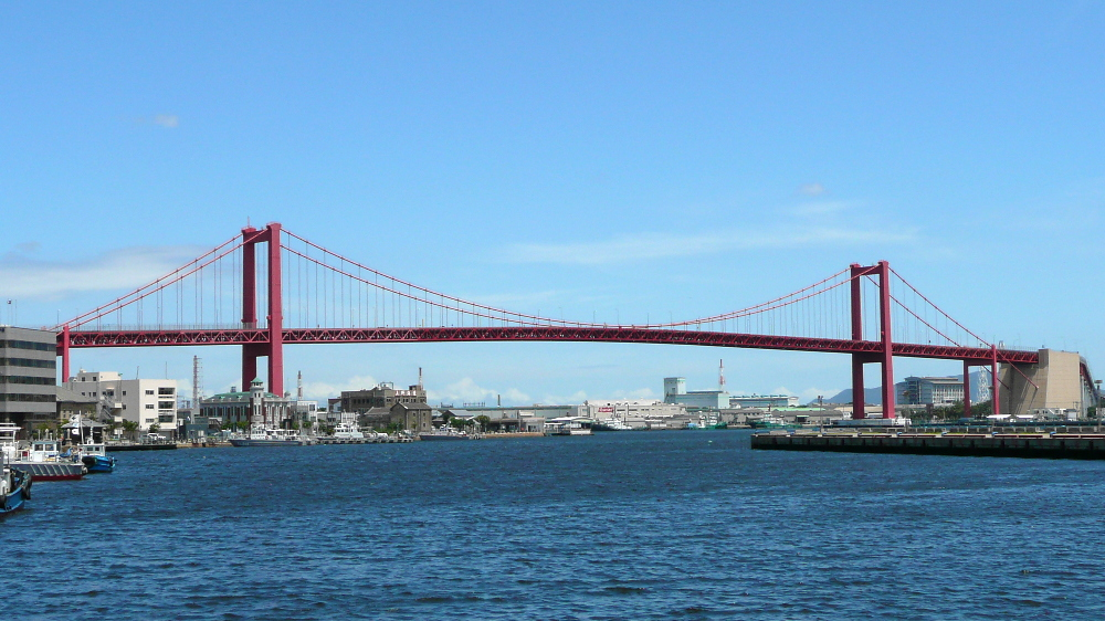 若松駅付近から望む若戸大橋 投稿者↑PON（ウエポン）が2007年8月12日に撮影 一部編集の上で2007年8月23日 (木) 17:33 (UTC)にアップロード Category:橋画像 Category:北九州市の画像